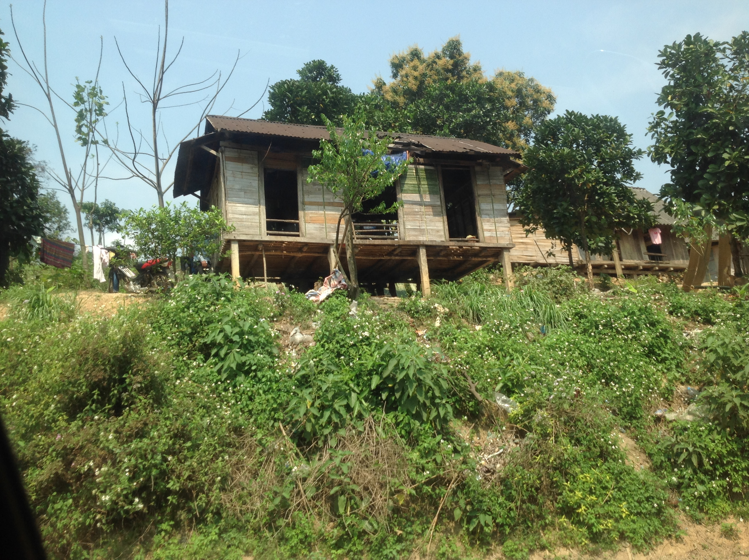 Hình chụp về huyện Hướng Hóa, Quảng Trị (nhà sàn của người dân tộc Vân Kiều-Pako)